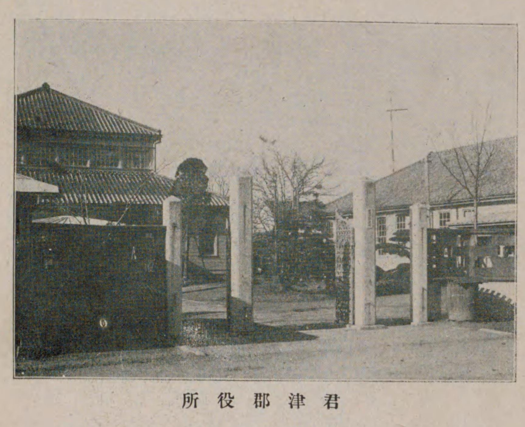 千葉県君津郡誌. 下巻 1927年頃の君津郡役所